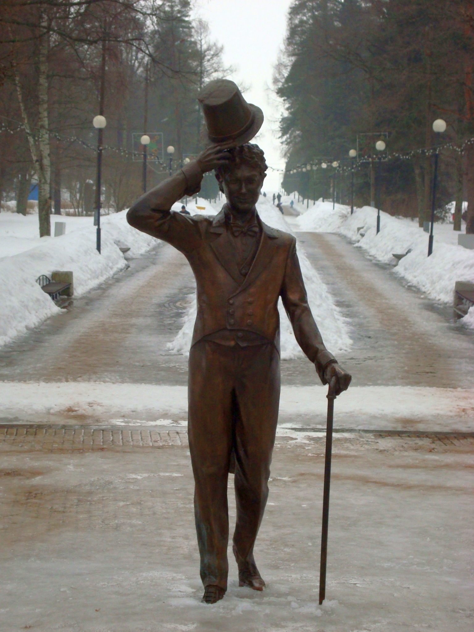 Памятник Вицину. Зеленогорск. Центральный Парк.